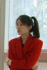 Jeong Geum-hyeong, a performance artist in the opening ceremony of FANTasia exhibition at Seoul Museum of Art